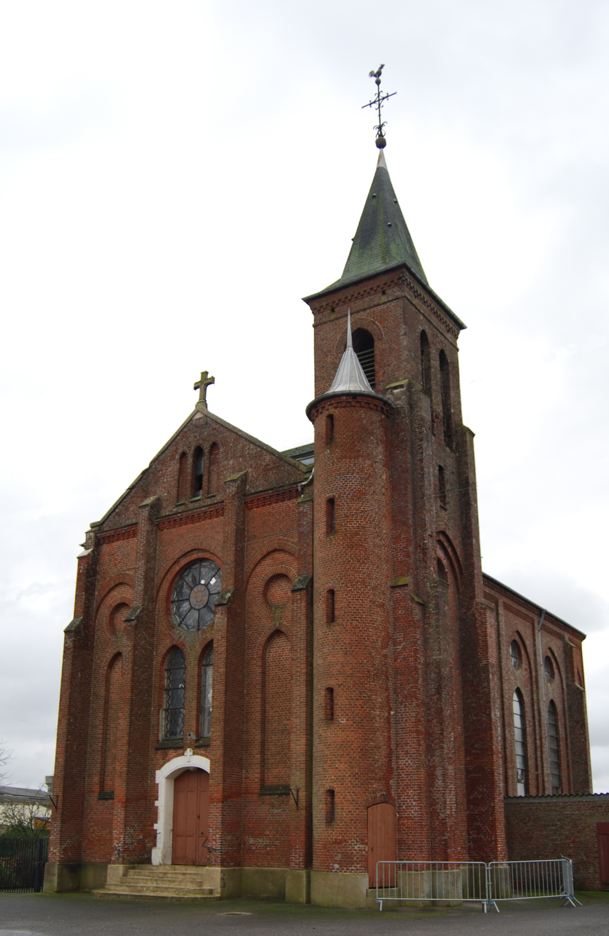 Eglise du Mont-Carnel du Chaudron (Origny-en-Thiérache, Aisne, Picardie, France)